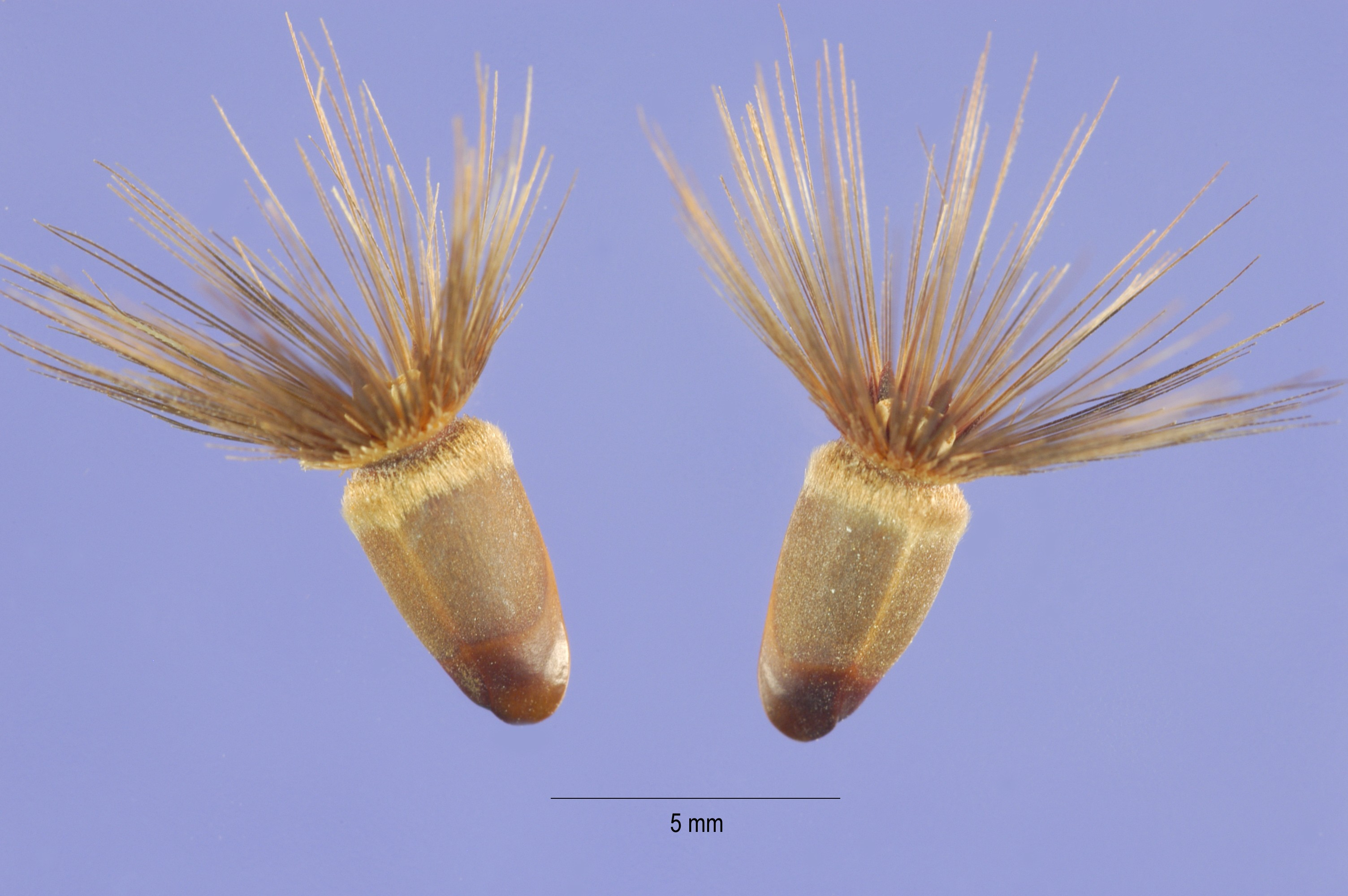 Crupina vulgaris : Cipselas sueltas - Talemansur (Irán).